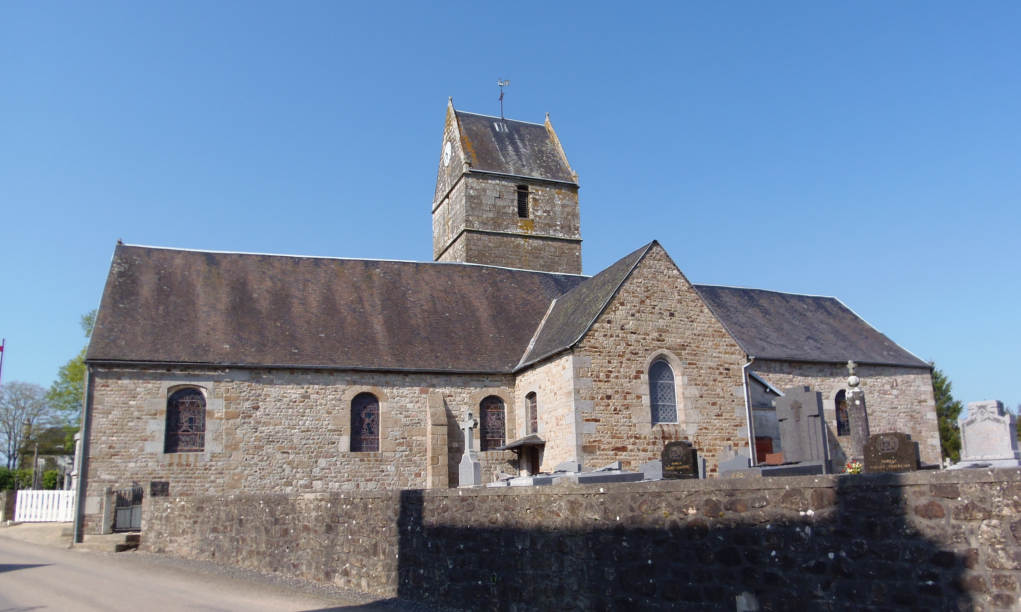 Beslon (Normandie, France). L'église Notre-Dame.